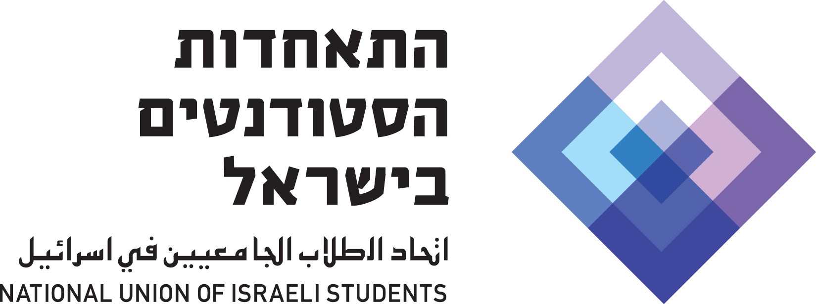 הלוגו החדש (2012) של התאחדות הסטודנטים בישראל The new logo (2012) of the National Union of Israeli Students